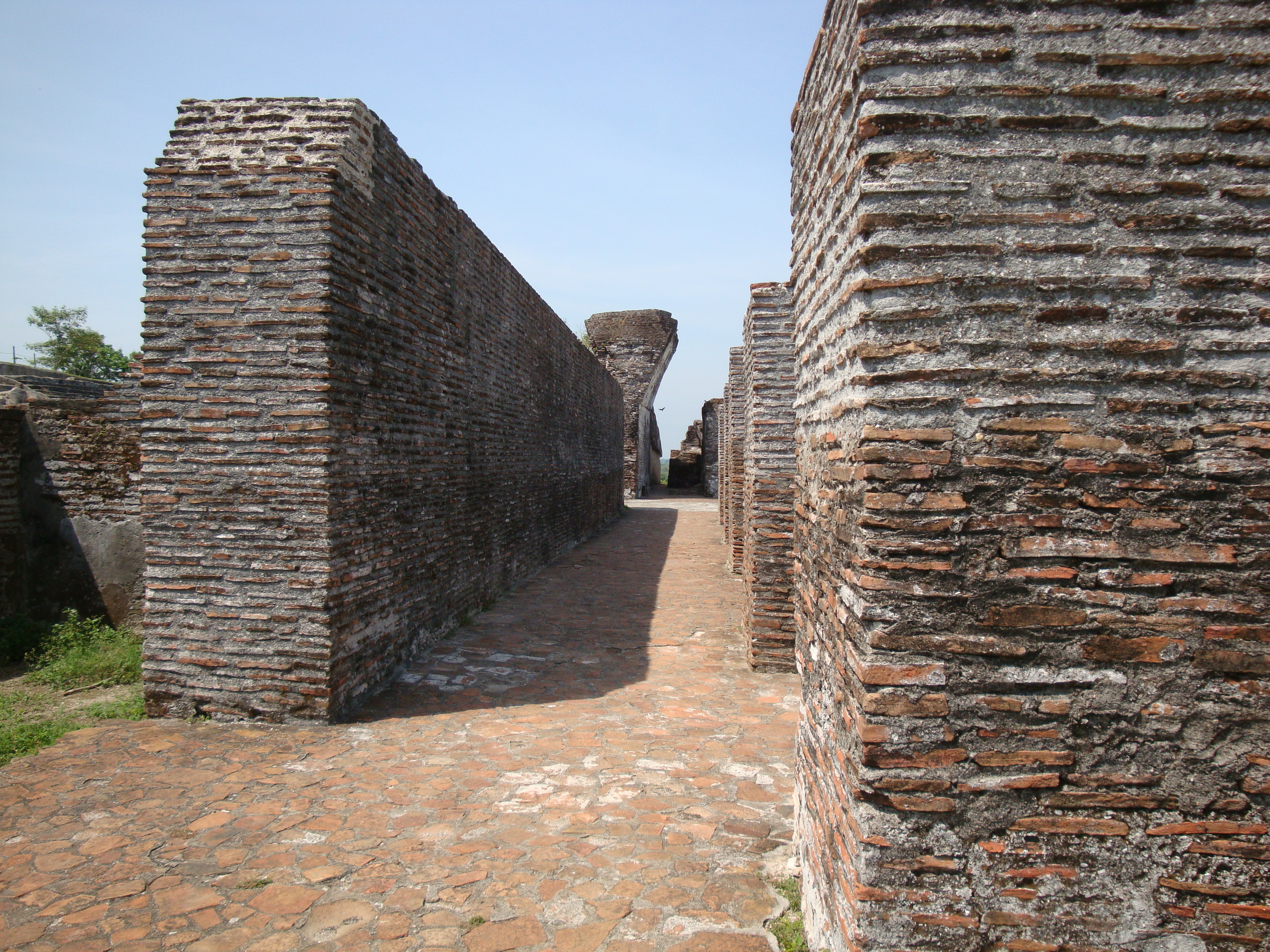 Pasillo en la cima de El Palacio, en la ciudad maya de Comalcalco, Tabasco, México.